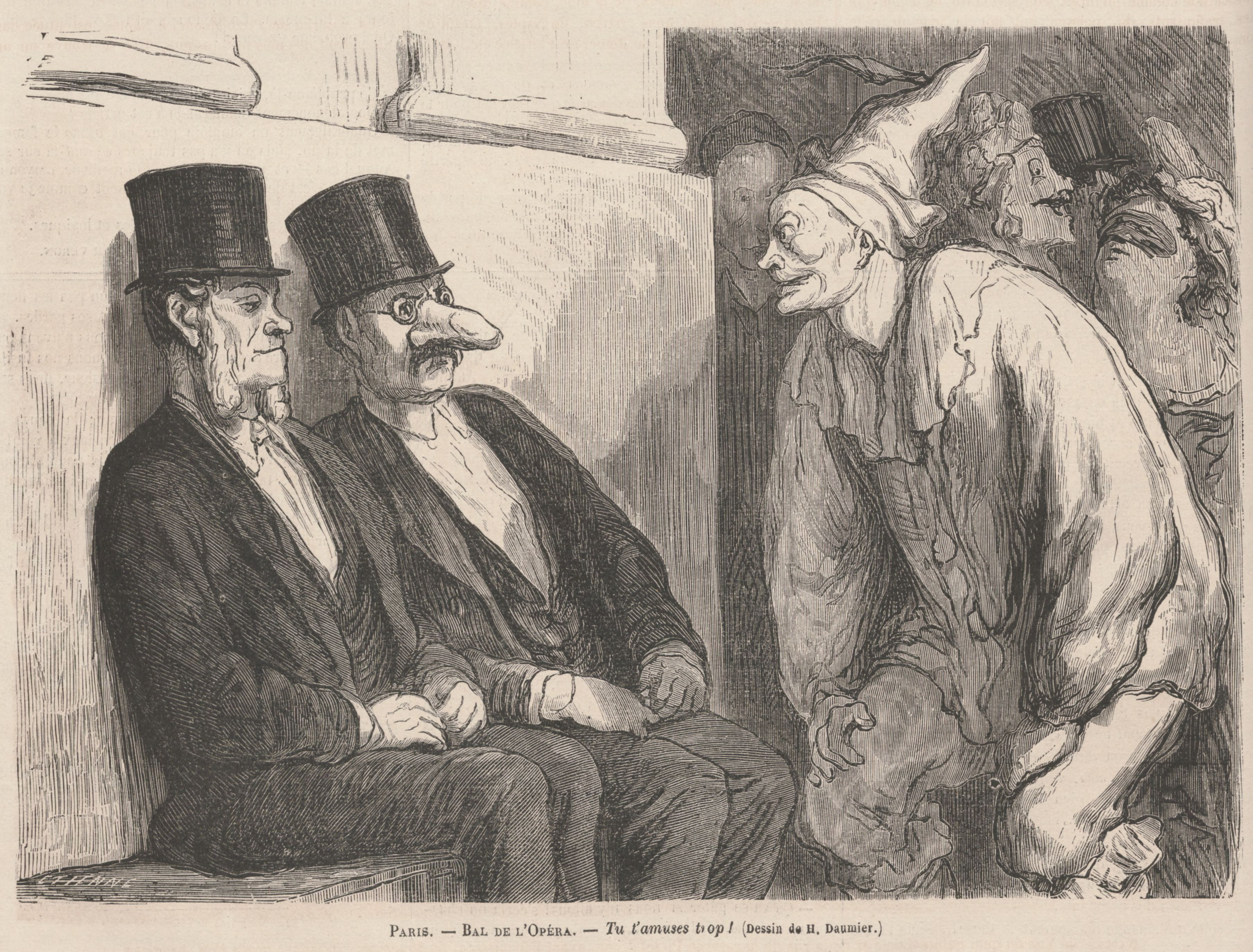 Scène comique du Carnaval de Paris.